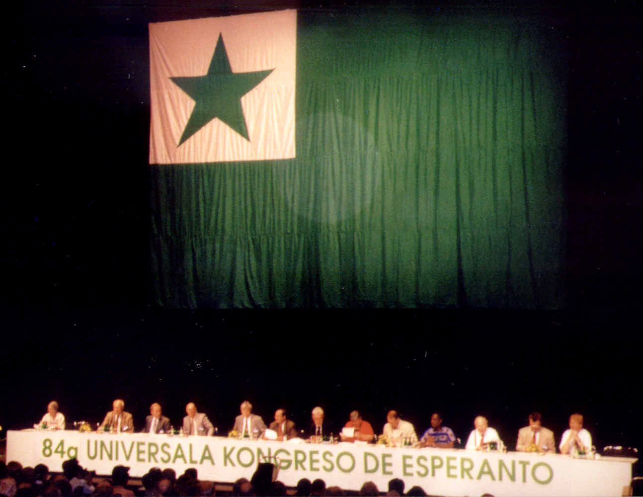 Solena Fermiĝo, Universala Kongreso, Berlino, 1999